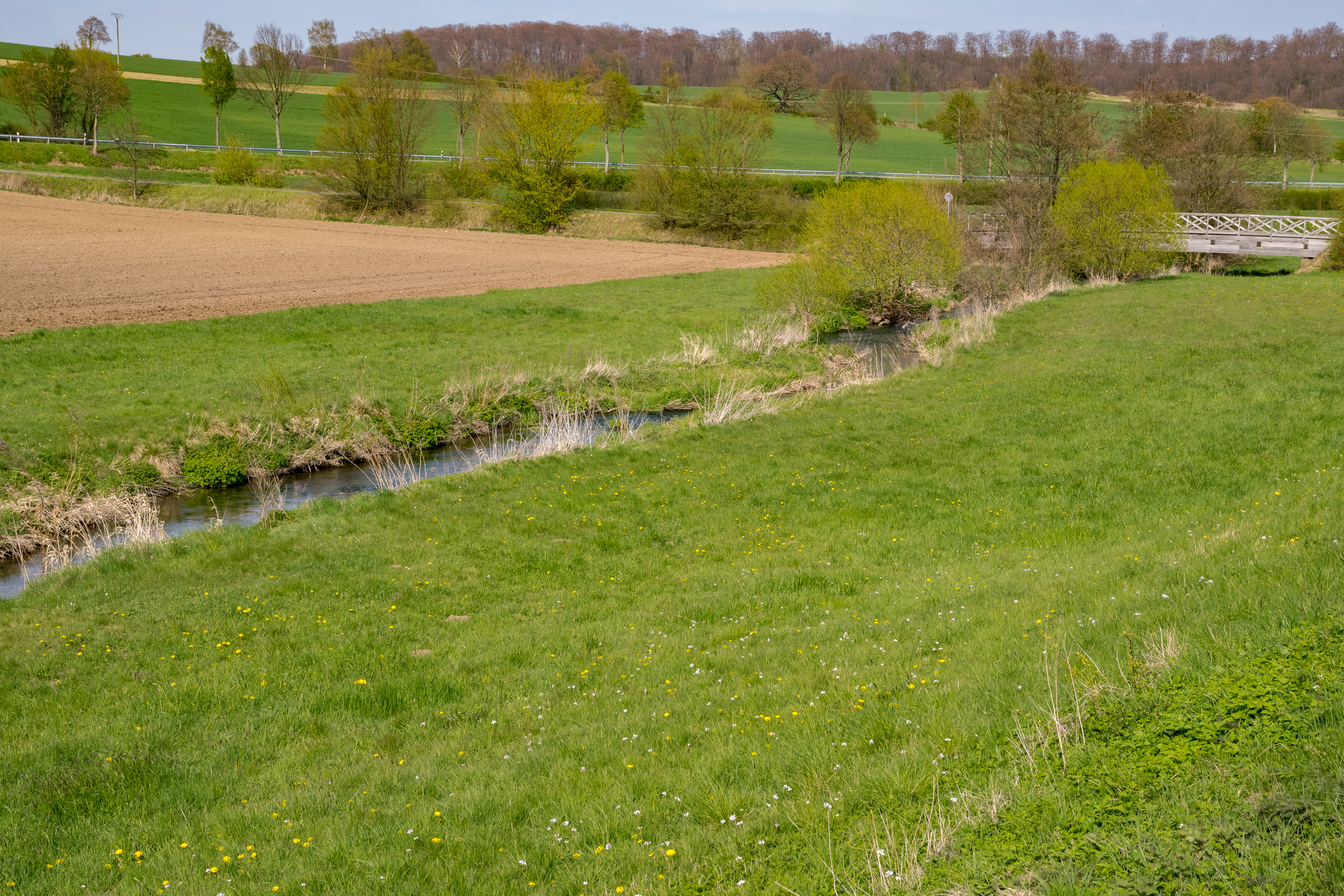 Naturschutzgebiet Nethe östlich von Willebadessen, Kreis Höxter